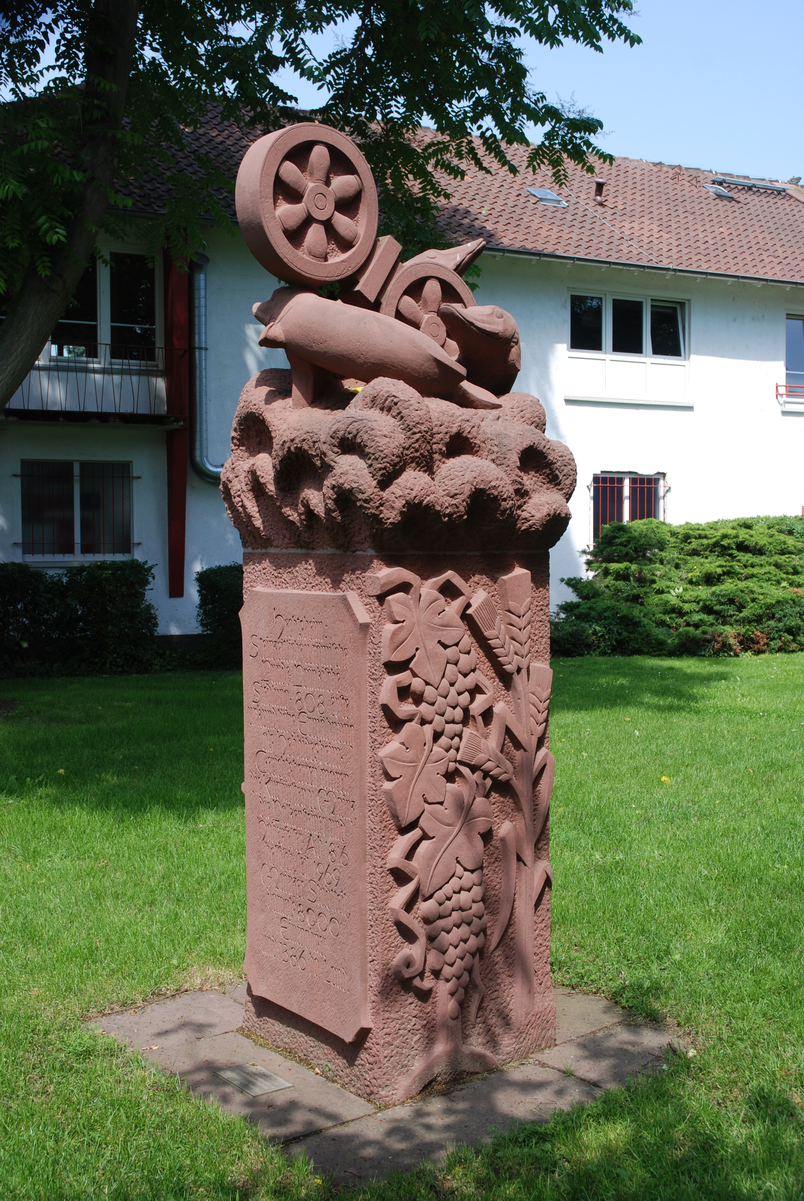 Erwin Mosen: Bürgerdenkmal (1982). Gestiftet vom Ortsbeirat Mainz-Hechtsheim und dem Ausbildungszentrum der Handwerkskammer Rheinhessen. Standort: Freiwillige Feuerwehr Mainz-Hechtsheim, Bürgermeister-Schmitt-Str. / Am Schinnergraben